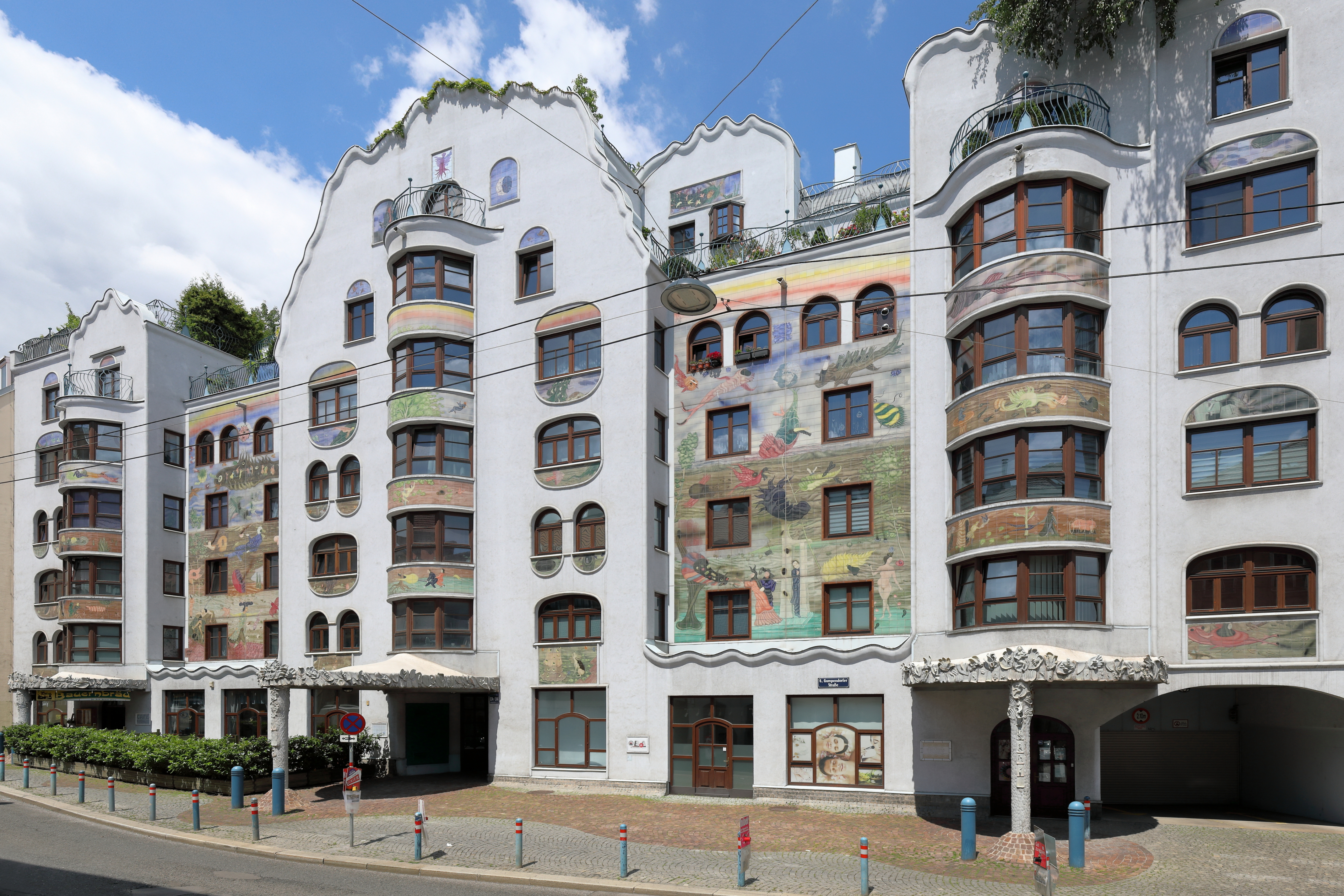 Das Arik-Brauer-Haus an der Adresse Gumpendorfer Straße 134-136 im 6. Wiener Gemeindebezirk Mariahilf.Das fünfstöckige Wohnhaus (33 Wohnungen, drei Geschäftslokale) wurde von dem Wiener Künstler Arik Brauer gestaltet - unter anderem mittels zwei großen Fliesenbildern an der Frontseite. Die Planung führte im Auftrag der MA 19 (Architektur und Stadtgestaltung) Peter Pelikan durch, der bereits mit Friedensreich Hundertwasser gearbeitet hatte. Das Modell wurde der Öffentlichkeit am 27. Jänner 1987 präsentiert, ab 1991 wurde das Haus errichtet und im April 1994 vom Bürgermeister Helmut Zilk eröffnet.